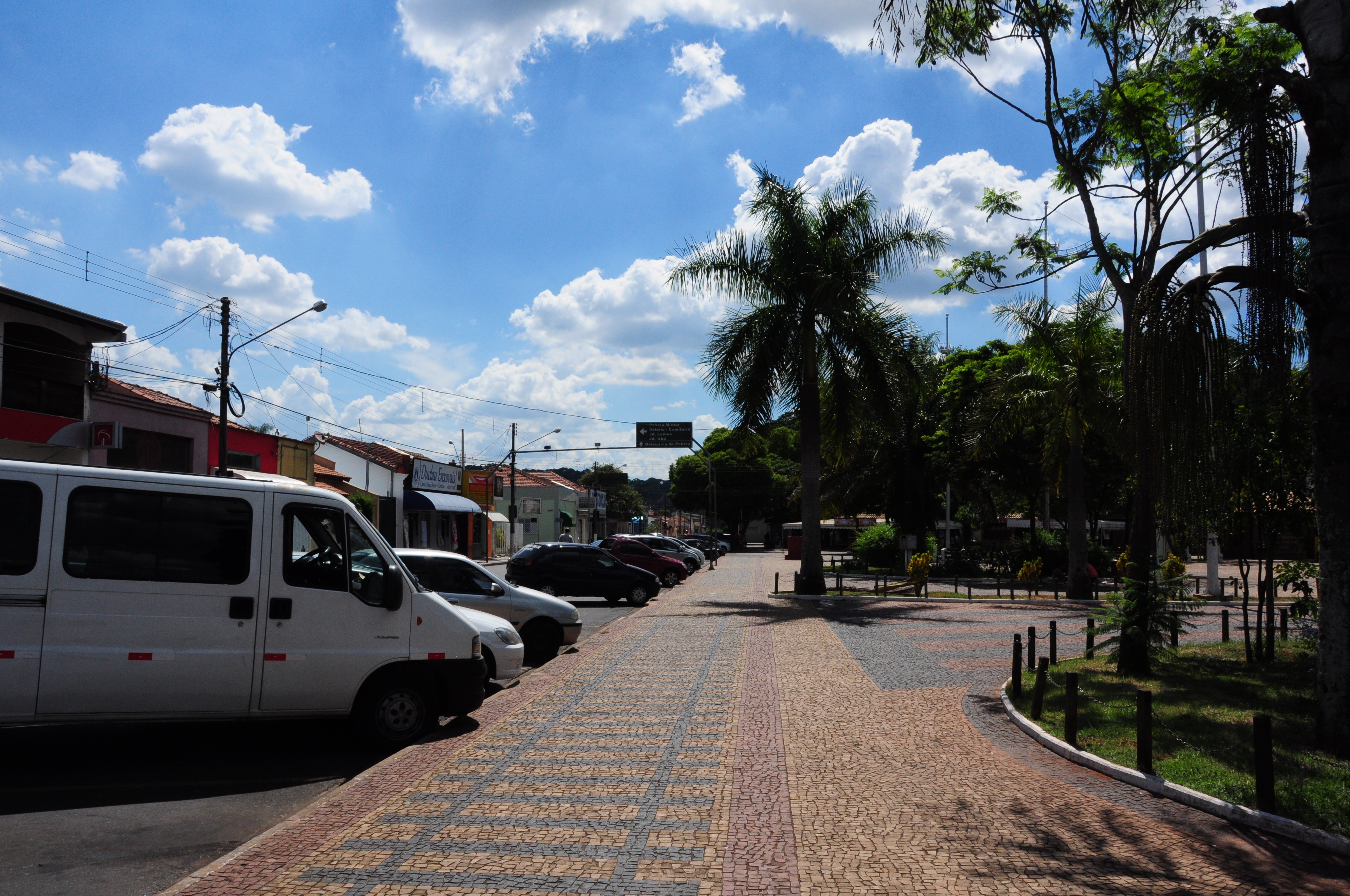 Praça 2013-11-29